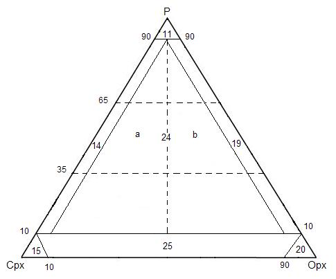 trójkąt POpxCpx